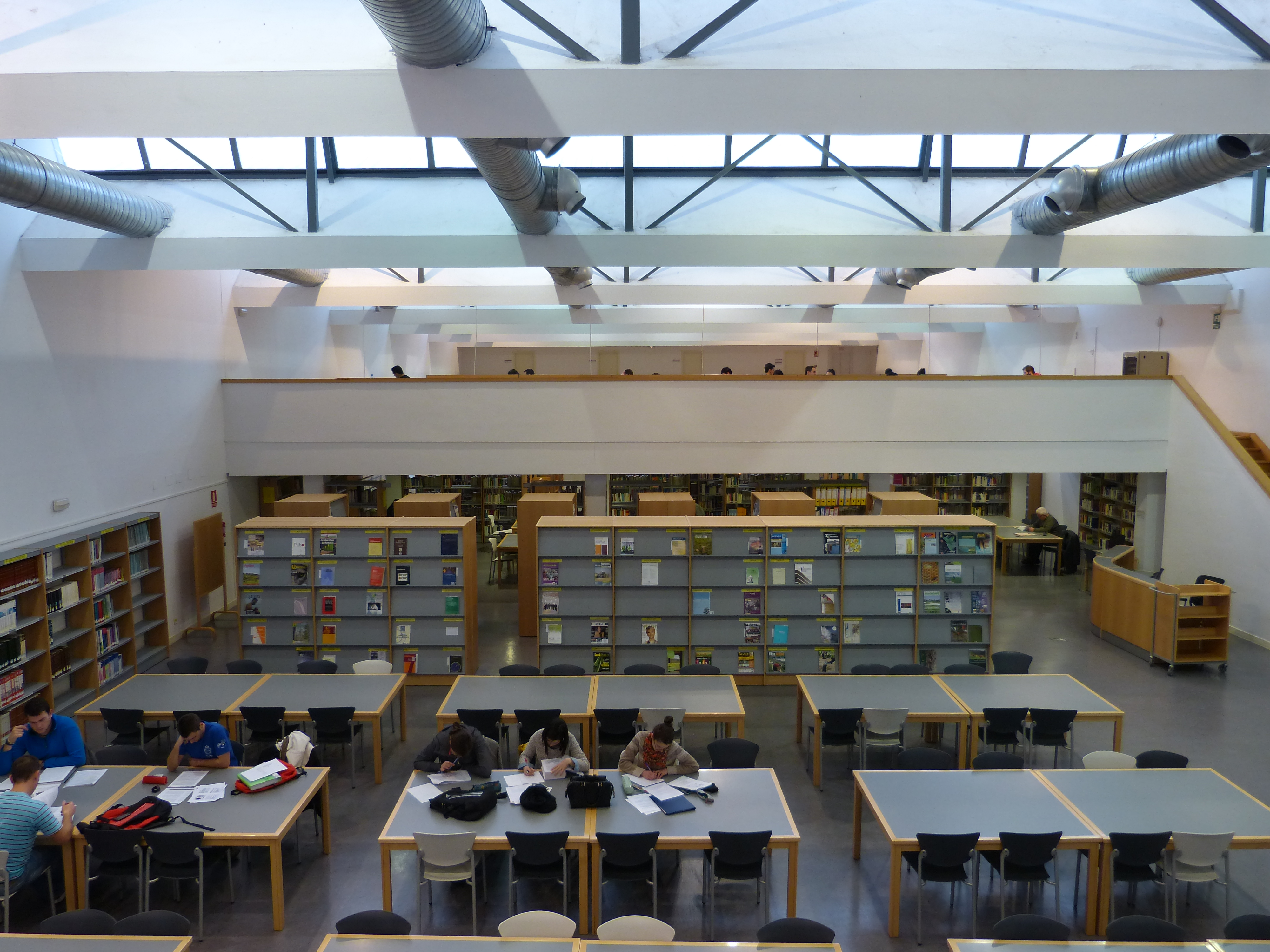 Biblioteca de Campus de Palencia, La Yutera, Universidad de Valladolid